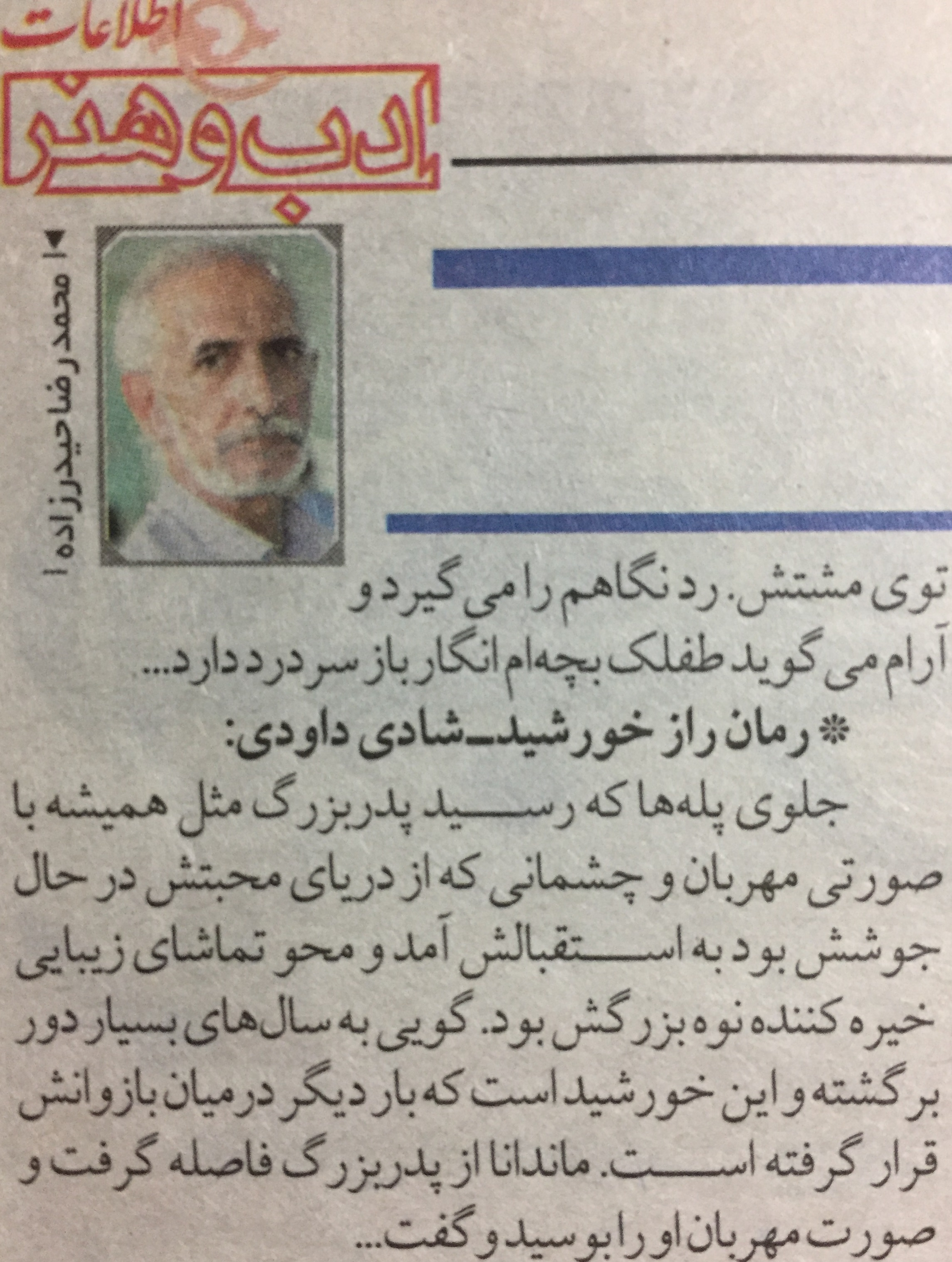 رمان «راز خورشید» به عنوان رمانی با نقش پررنگ در صحنه ی ادبیات شناخته شد.